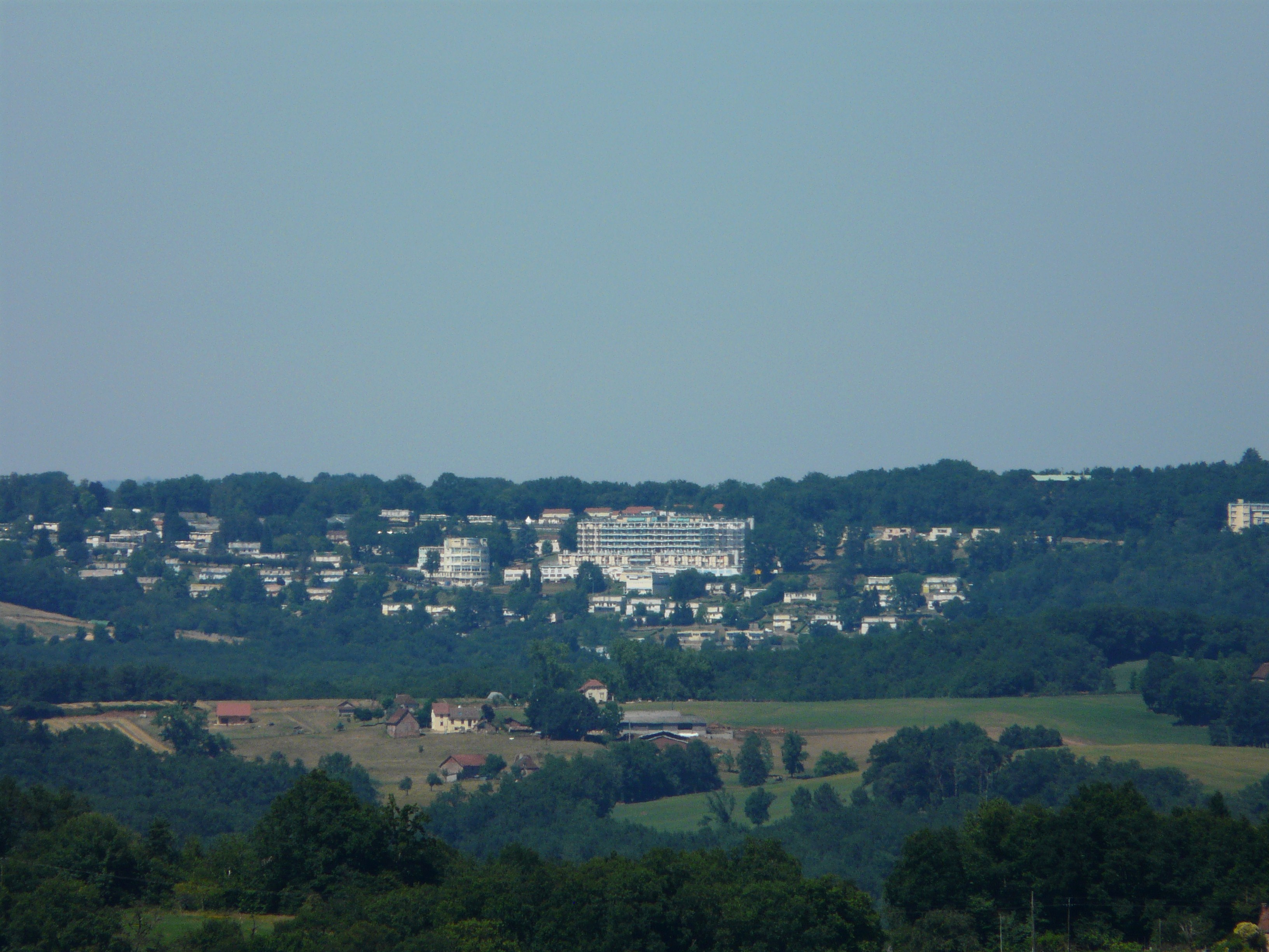 La cité de Clairvivre à Salagnac vue depuis le puy de Raffaillac, Badefols-d'Ans, Dordogne, France.